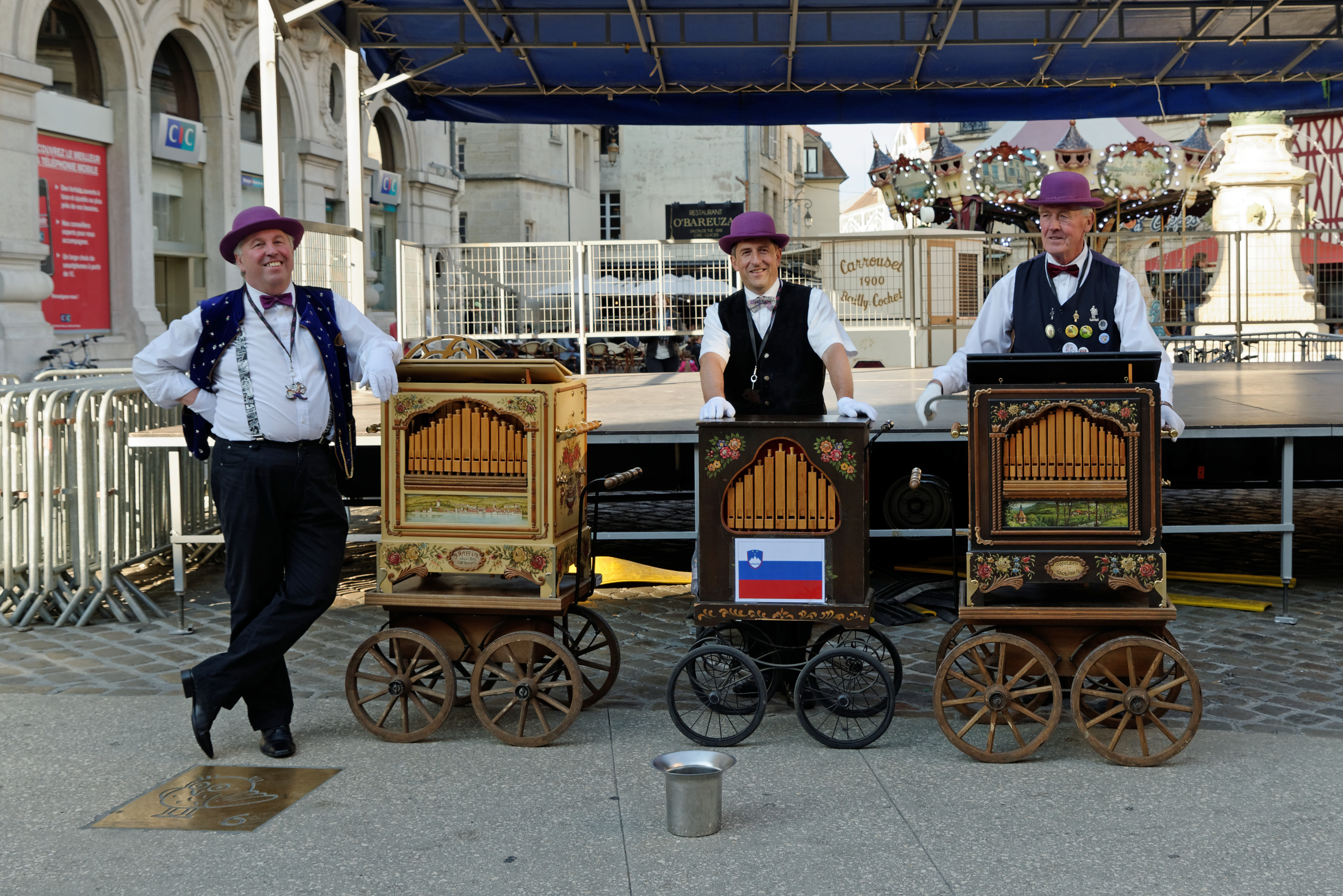 Festival de musique mécanique de Dijon 2015 (Côte d'Or, Bourgogne, France)